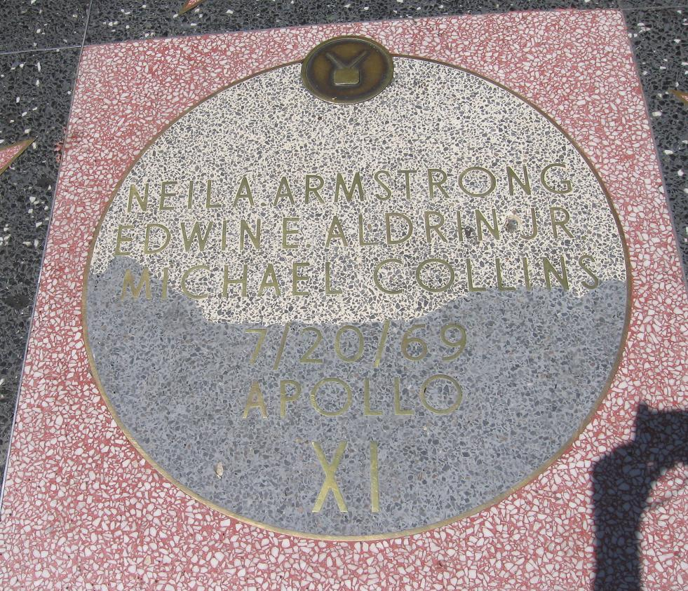 La plaque commémorative de la mission Apollo 11 sur Hollywood Boulevard